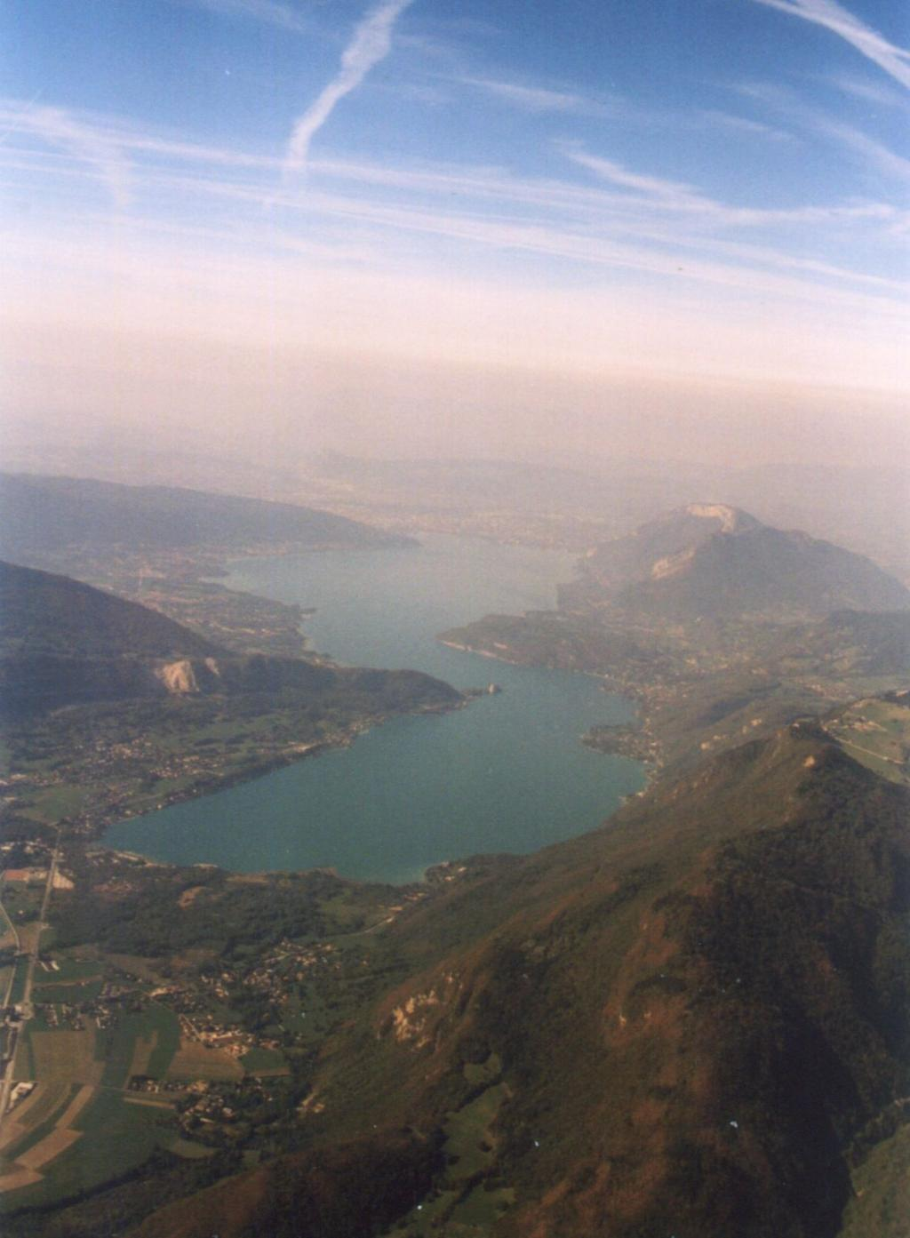 Lac d'Annecy - vue d'avion au sud du lac - (c) 2003, Didier Halatre. Permission vous est donnée de copier, distribuer et/ou modifier ce document selon les termes de la Licence GNU Free Documentation License, Version 1.2 ou ultérieure publiée par la Free Software Foundation ; sans sections inaltérables et sans pages de couverture. [1] Permission is granted to copy, distribute and/or modify this document under the terms of the GNU Free Documentation License, Version 1.2 or any later version published by the Free Software Foundation; with no Invariant Sections, no Front-Cover Texts, and no Back-Cover Texts. [2] La photo a été prise d'avion, à la verticale de Faverges à 10 500' (env. 3 200 m) vers le nord, mi-septembre 2003. Temps beau mais brumeux dans le lointain. Image:LacAnnecy.jpg Image:LacAnnecy_pt_com.jpg On distingue bien le « petit lac » au premier plan du « grand lac » en arrière. La séparation est marquée à gauche (ouest) par le Taillefer qui donne la presqu'île de Duingt (le point blanc est la château de Duingt !), et à droite (est) par le Roc de Chère. Au point de vue massif, à gauche (ouest), on a le massif des Bauges, avec sur la photo le Taillefer avec juste derrière le début du Roc des Boeufs, et en arrière plan le Semnoz. À droite (est), on a le massif des Bornes, à droite en vert clair, il y a le Col de la Forclaz, le massif important en arrière-plan est le Mont Veyrier. Annecy et Annecy-le-Vieux se distinguent légèrement dans la brume, au nord du lac (en haut de la photo) entre le Semnoz et le Mont Veyrier.